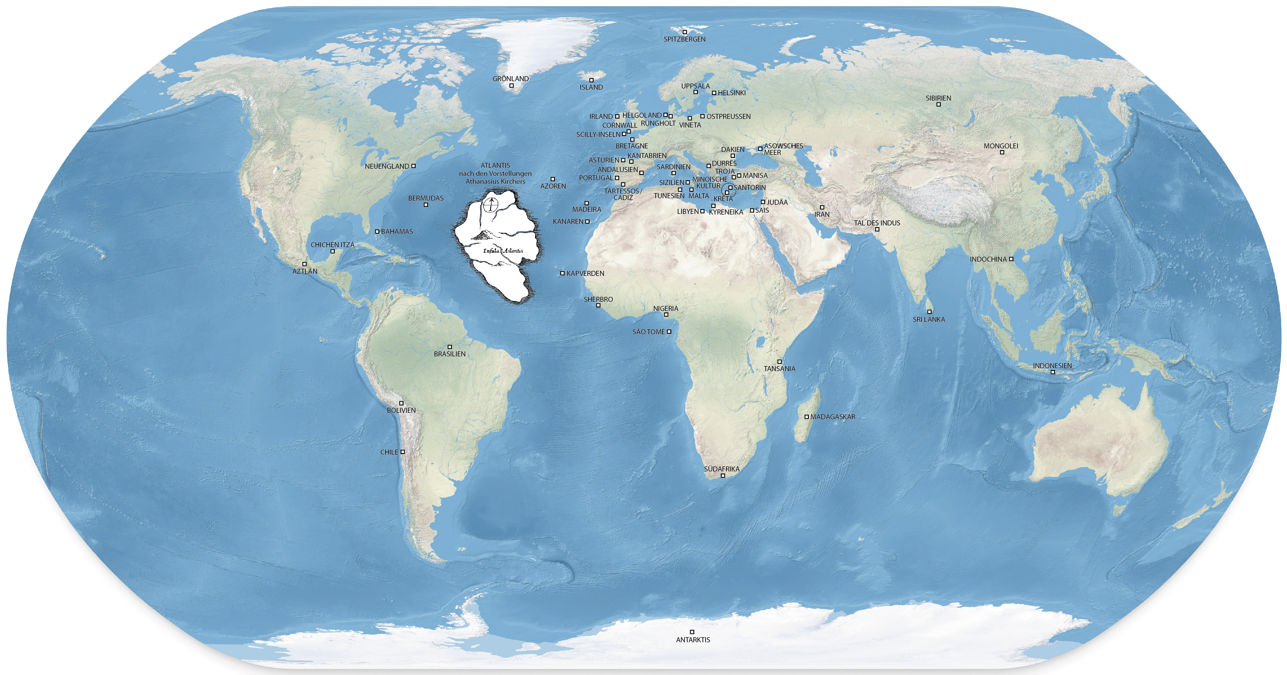 Karte der Lokalisierungshypothesen zu Atlantis